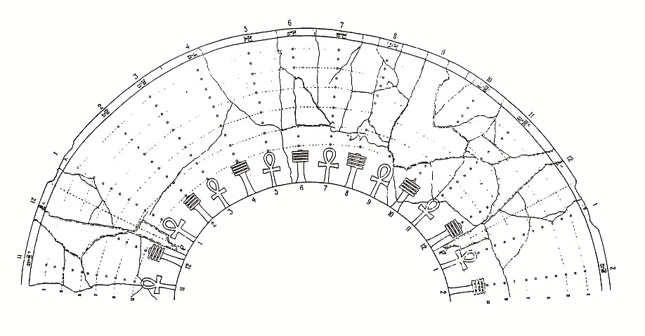 Description de l'intérieur de la clepsydre de Karnak